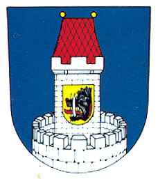 Znak Rožmitálu pod Třemšínem z